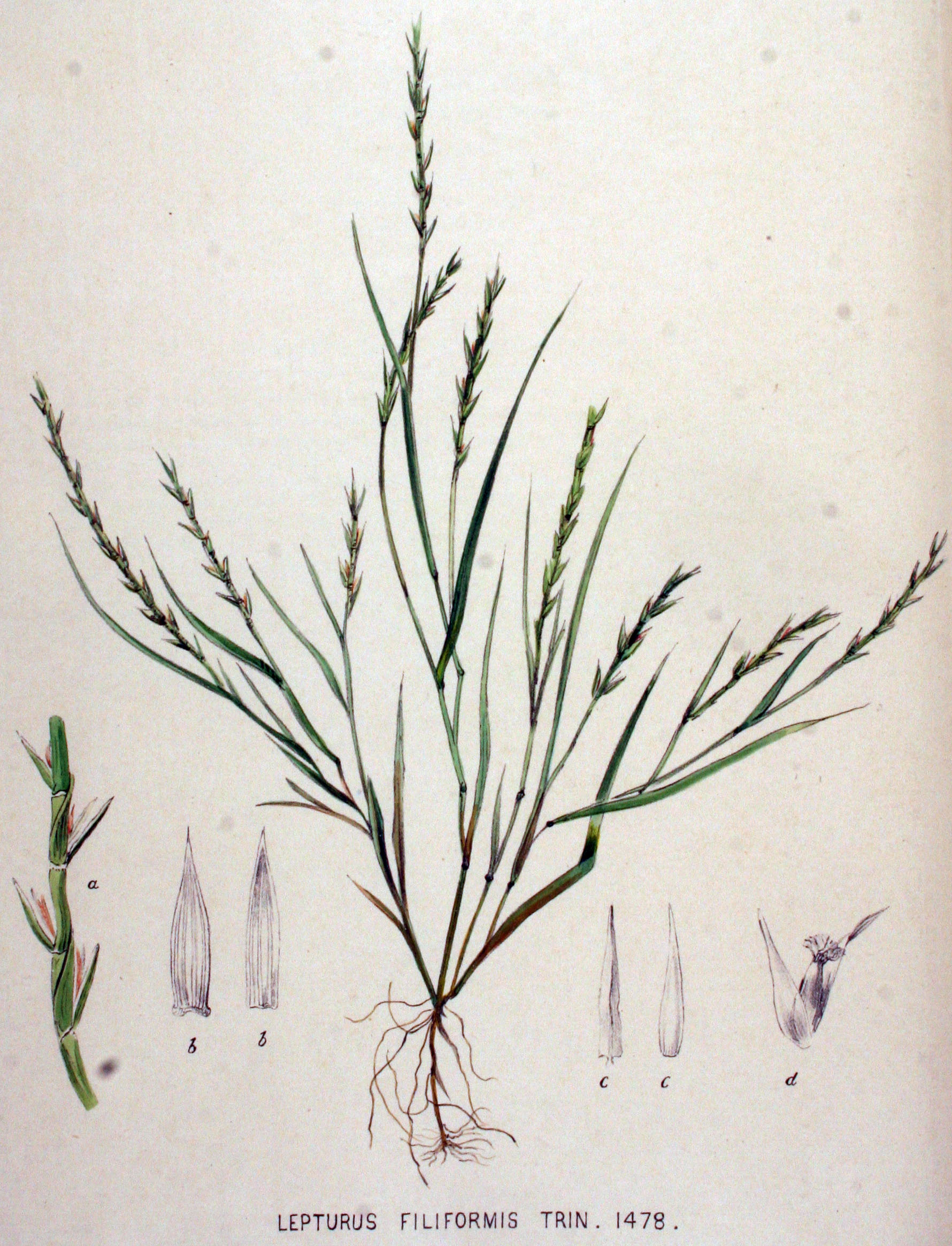 Parapholis strigosa (Dum.) C.E. Hubbard (Syn. Lepturus filiformis (Roth) Trin.)